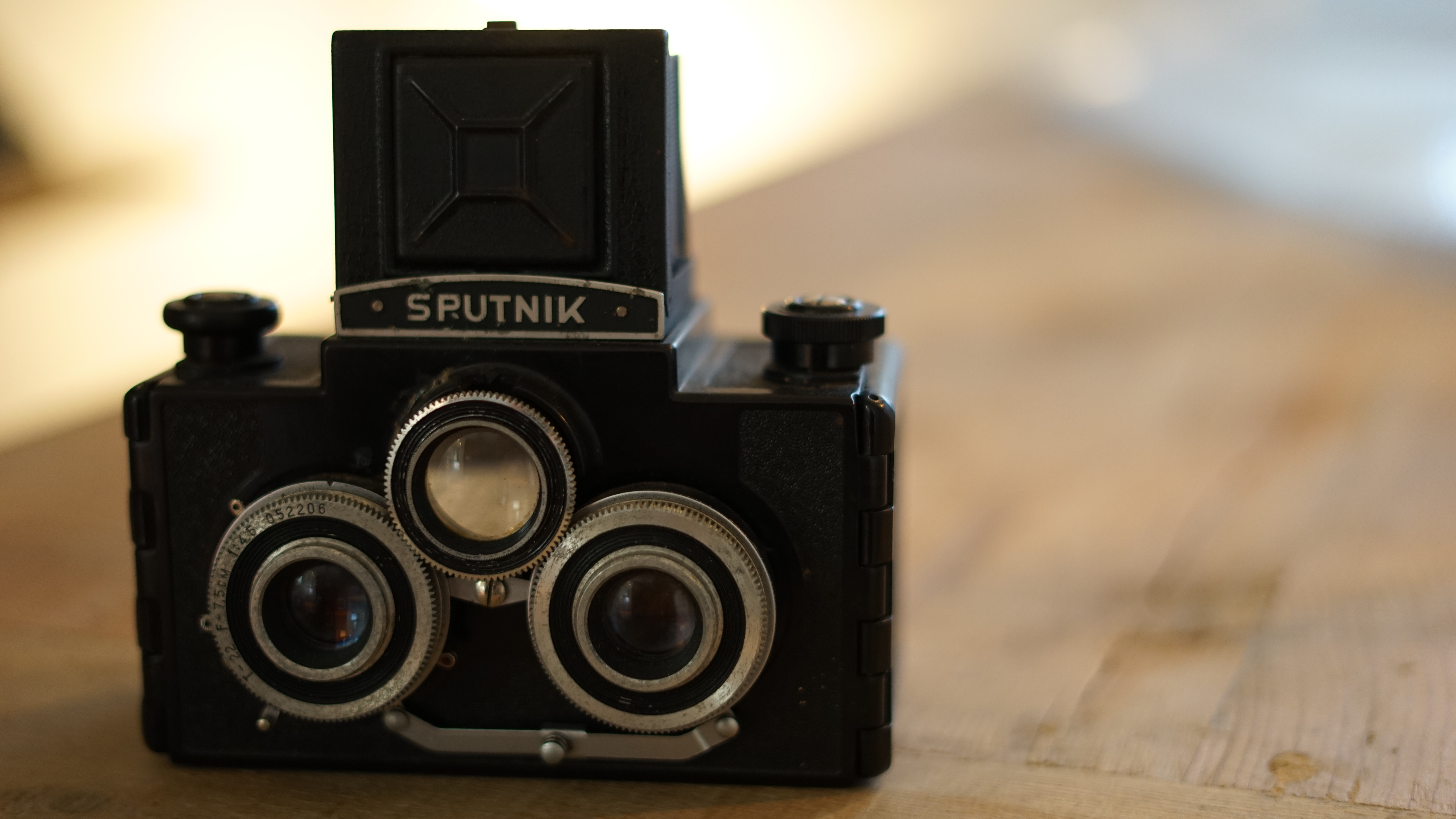 Càmera fotogràfica de mig format Sputnik.